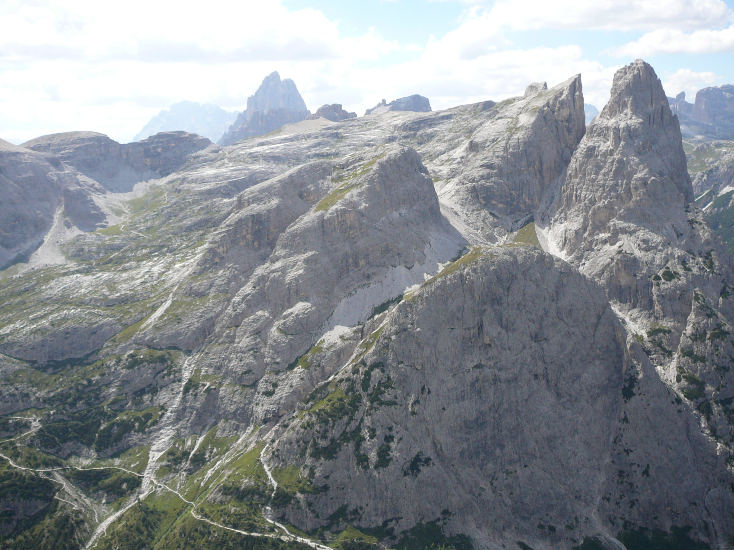 Panorama dolomitico: Tre Cime-Monte Paterno-Cima Una